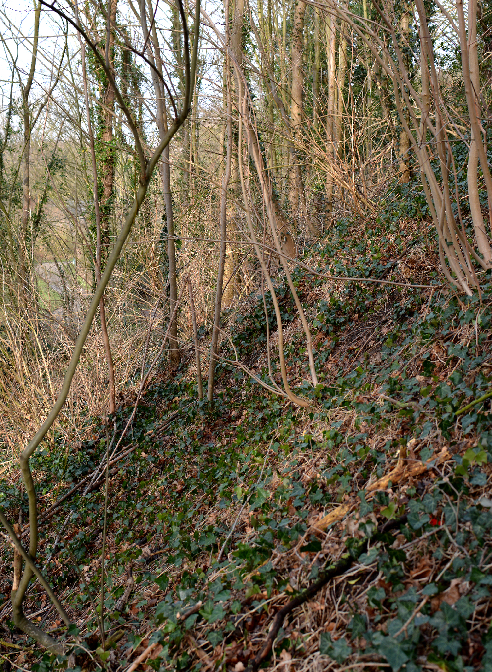 Alte Burg Verden, Steilhang